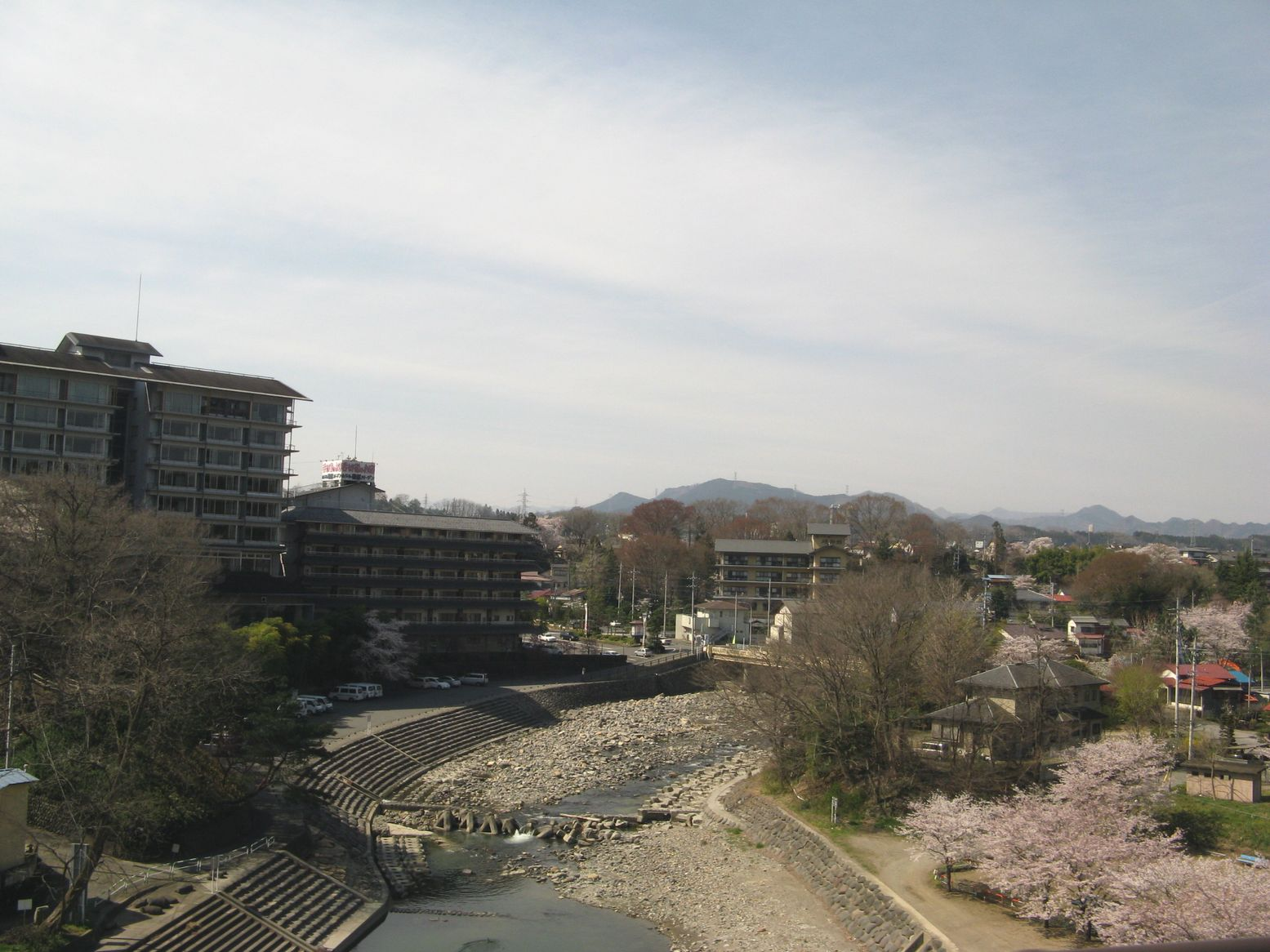 碓氷川とja:磯部温泉 愛妻橋から西望